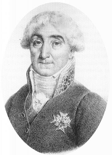 Raymond de Sèze (1748-1828), dit Romain Desèze